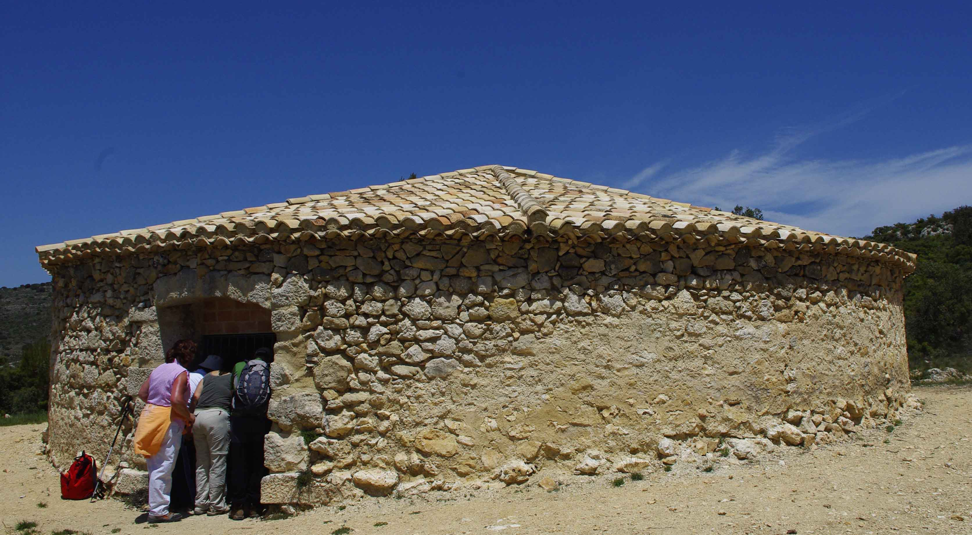 Pozo de Nieve del Canyo en Ibi, Alicante.